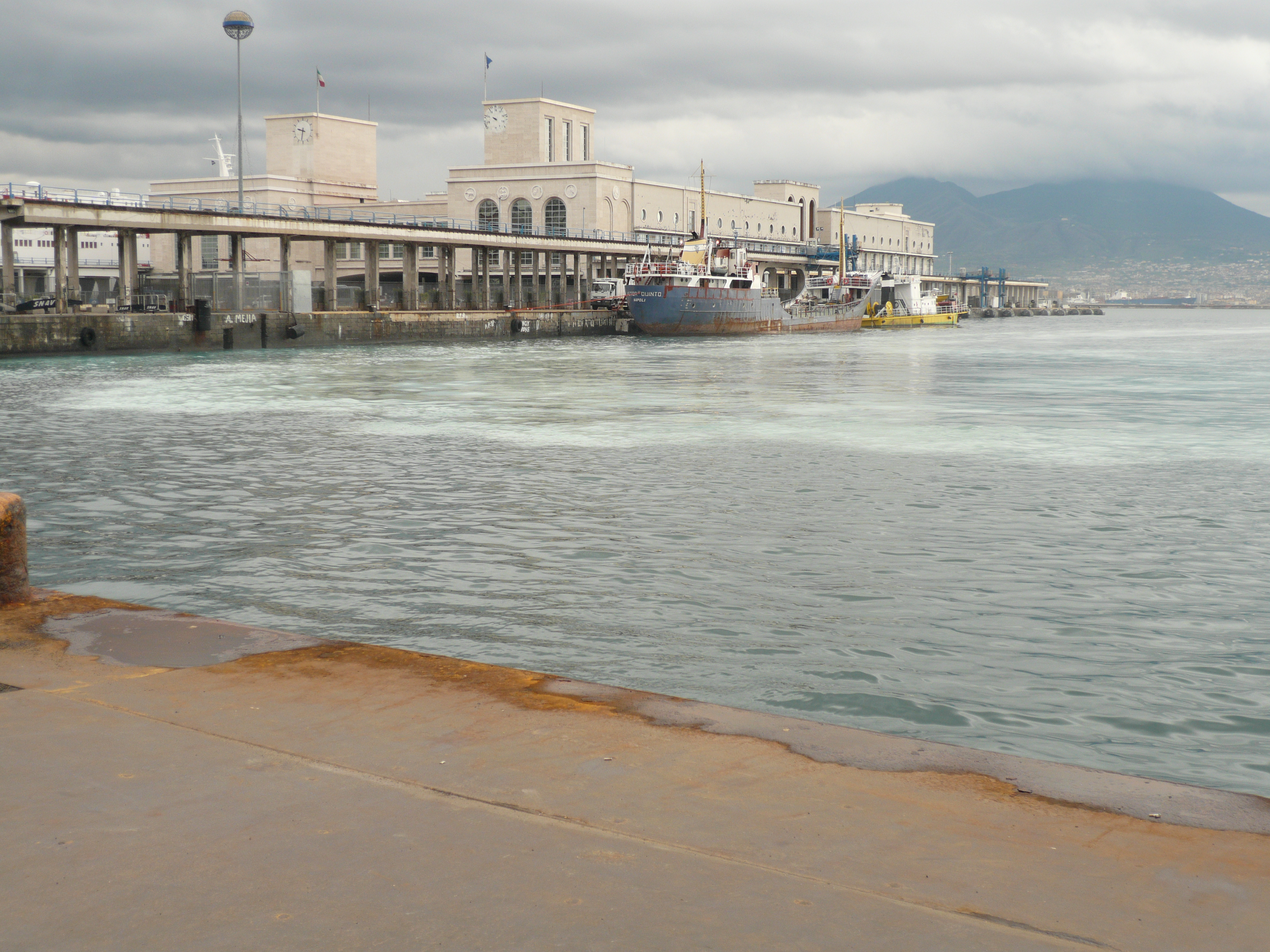 increspature sul mare causate da un aliscafo partito da Napoli per una delle isole del golfo. Autore foto: Roberto De Martino